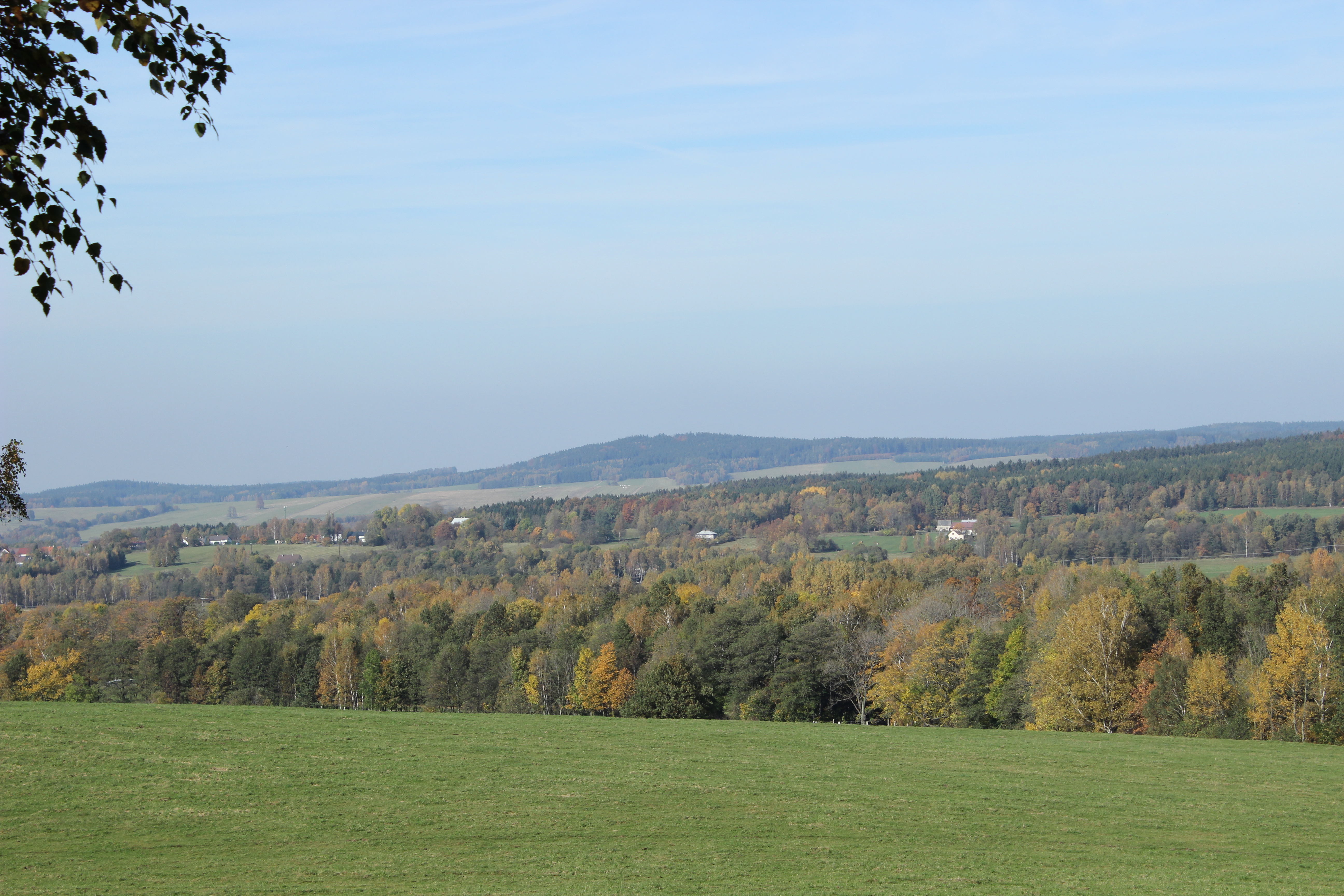 V centrální části snímku vrchol Nad nádražím nad Novým Městem pod Smrkem.